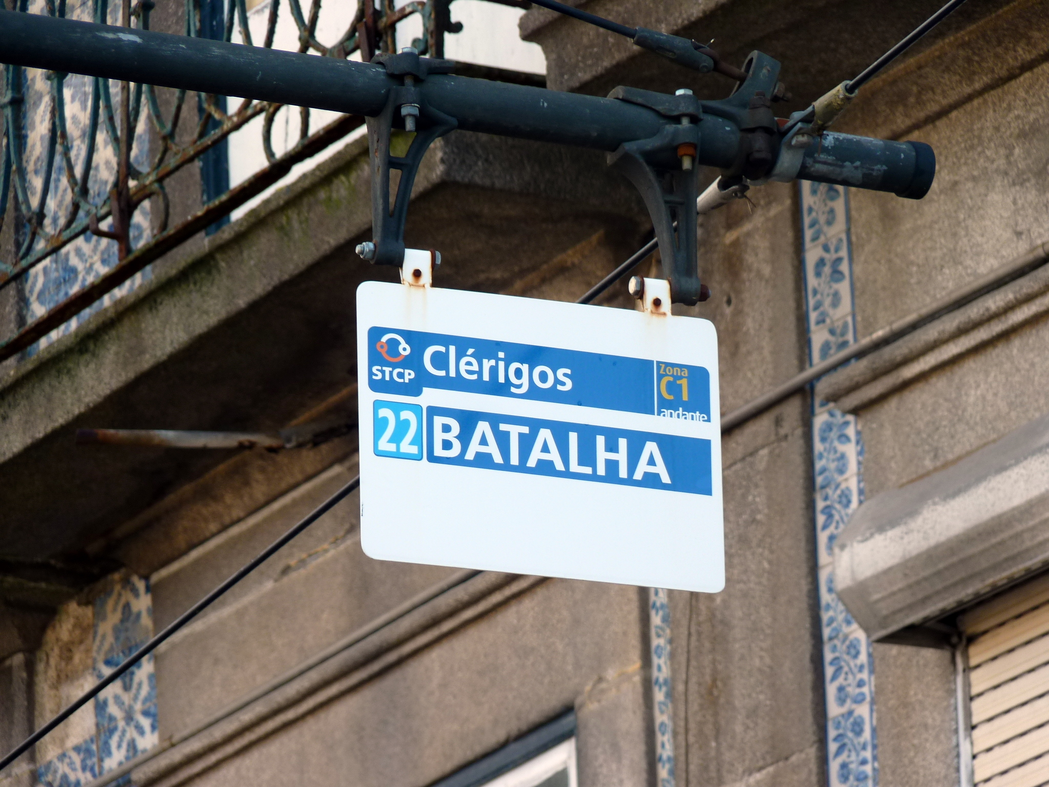 Placa de paragem de eléctricos, na Rua dos Clérigos, Porto, Portugal